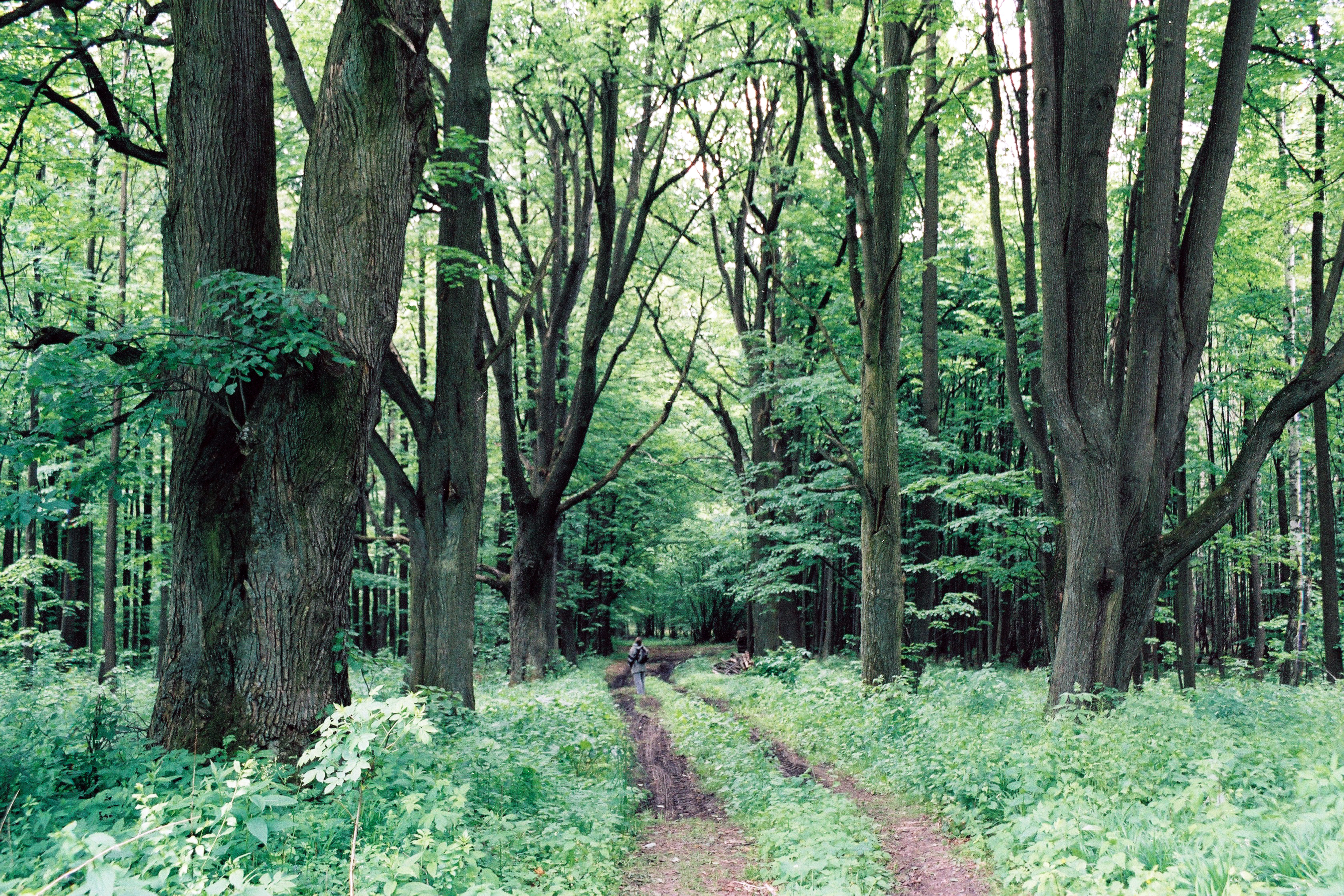 Aleja lipowa w pobliżu leśnictwa Lipowiec, gmina Koszęcin, powiat lubliniecki, województwo śląskie